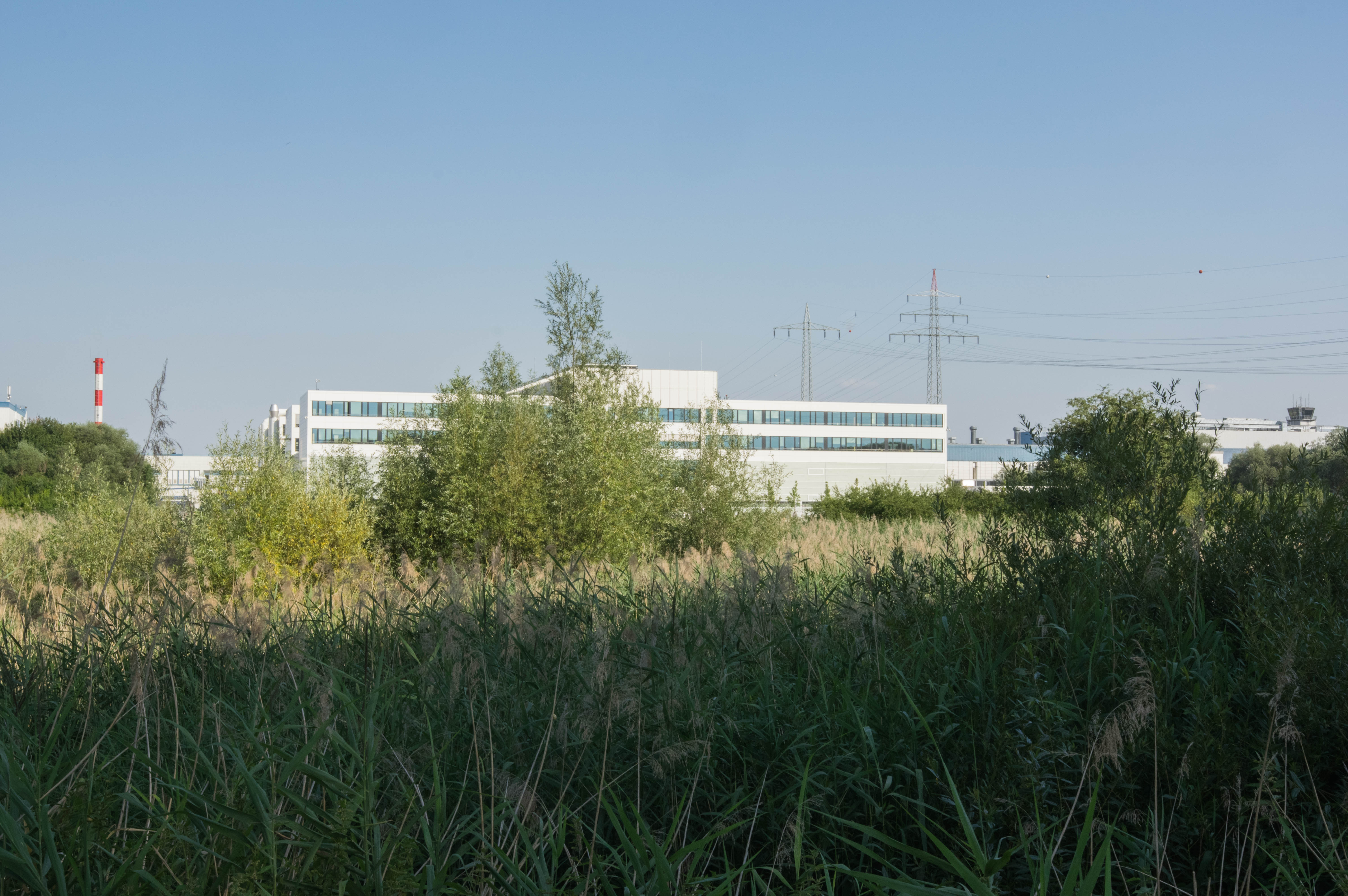 Landschaftsschutzgebiet Altwasser in Donauwörth mit aussergewöhnlicher Lage inmitten des Industriegebiets Süd, nördlich der Südspange. Das LSG wird östlich vom Areal Airbus Helicopters, südlich und westlich von Industrie- und Gewerbebetrieben darunter eine Großschlachterei, und nördlich von Bahngelände begrenzt. Gelistet unter Nr. LSG-00315.01